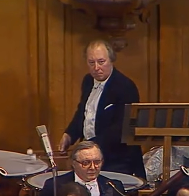 Снегирёв Валентин Михайлович